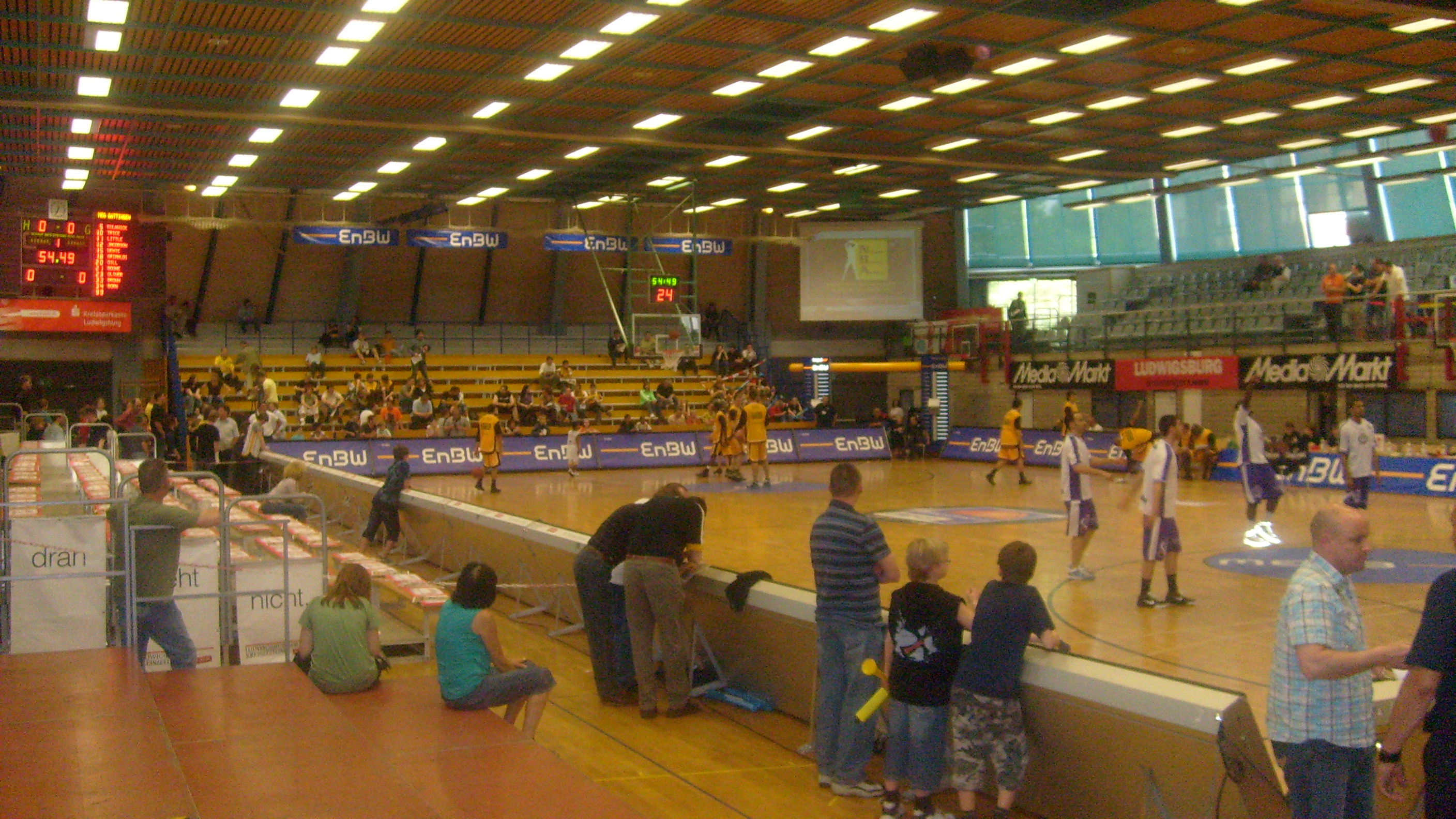 EnBW Ludwigsburg - BG 74 Göttingen vor dem Spiel